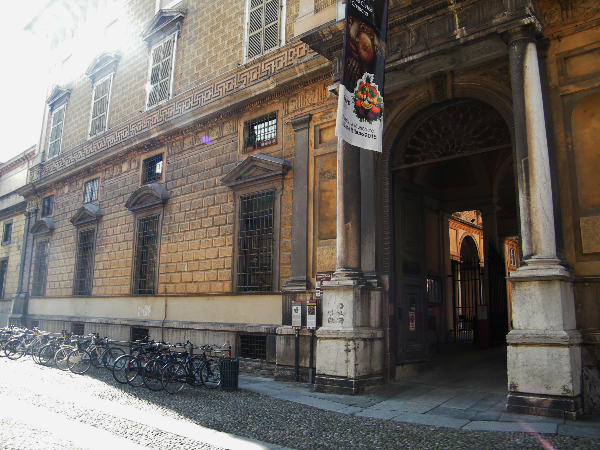 Palazzo Affaitati This is a photo of a monument which is part of cultural heritage of Italy.